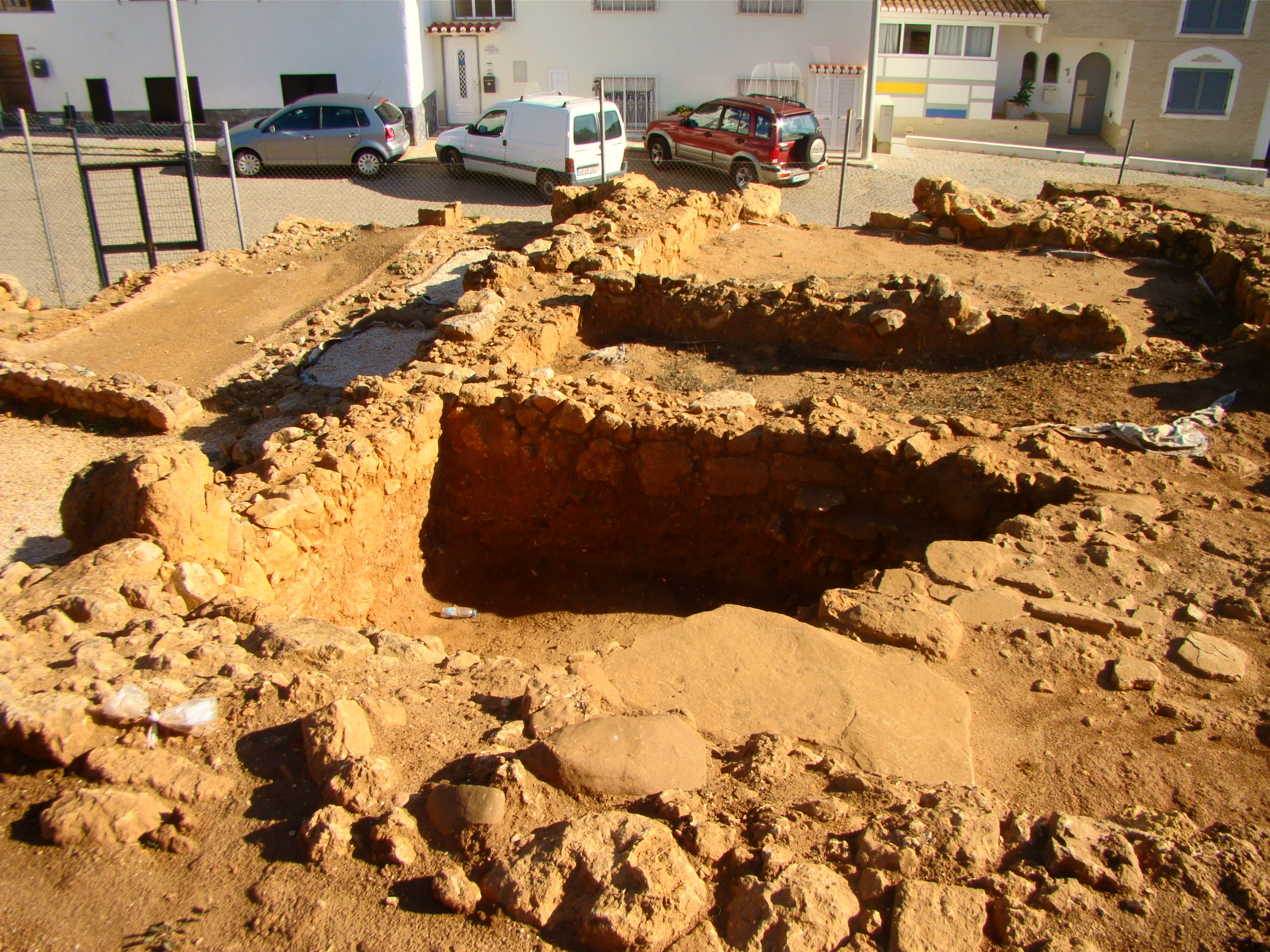 Monte Molião - Compartimento 5 II - 08.11.2017